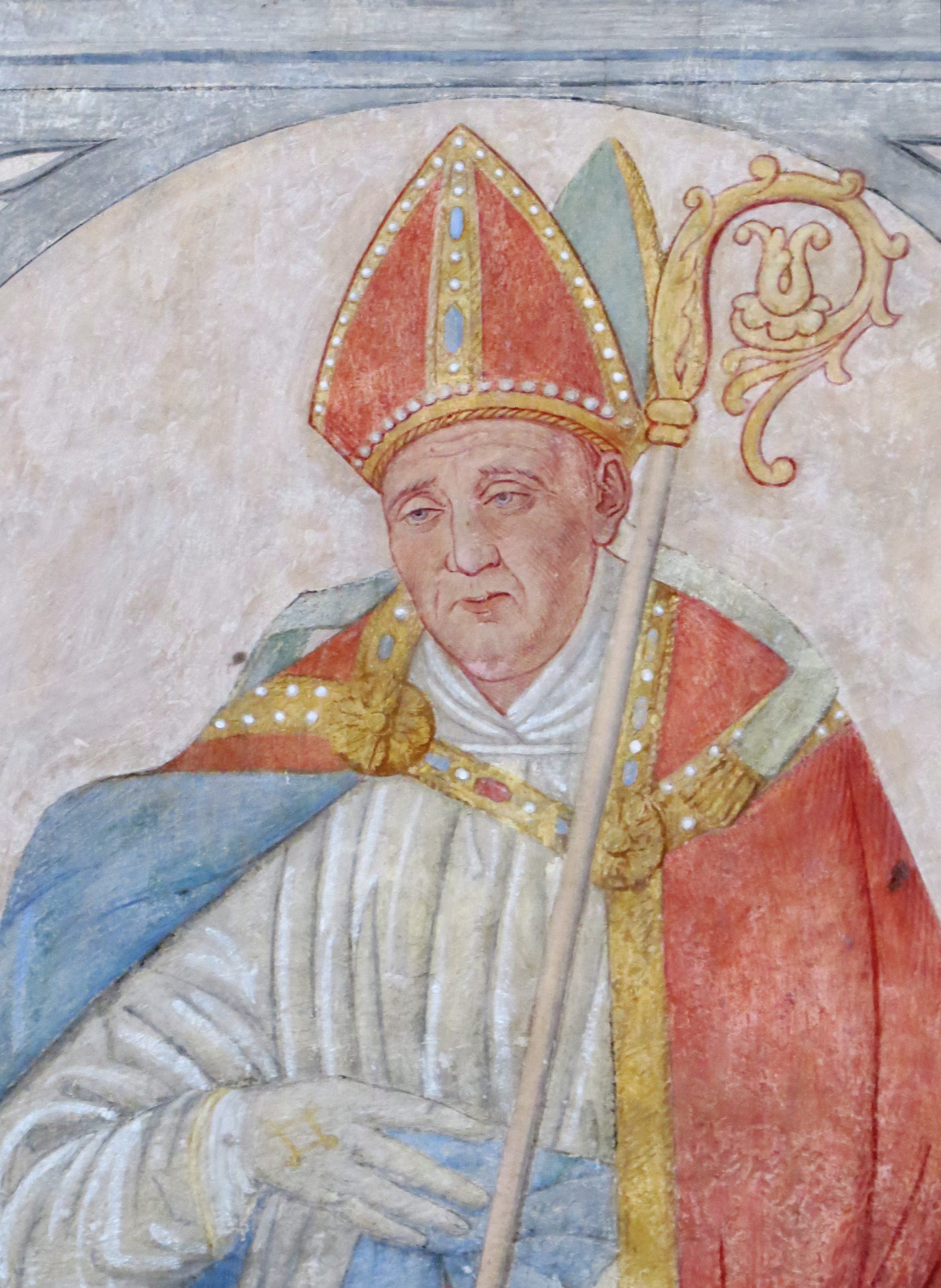 Biskop Vilhelm i Roskilde, død 1073 eller 1074, kalkmaleri fra 1500-tallet i Roskilde Domkirke, Sjælland